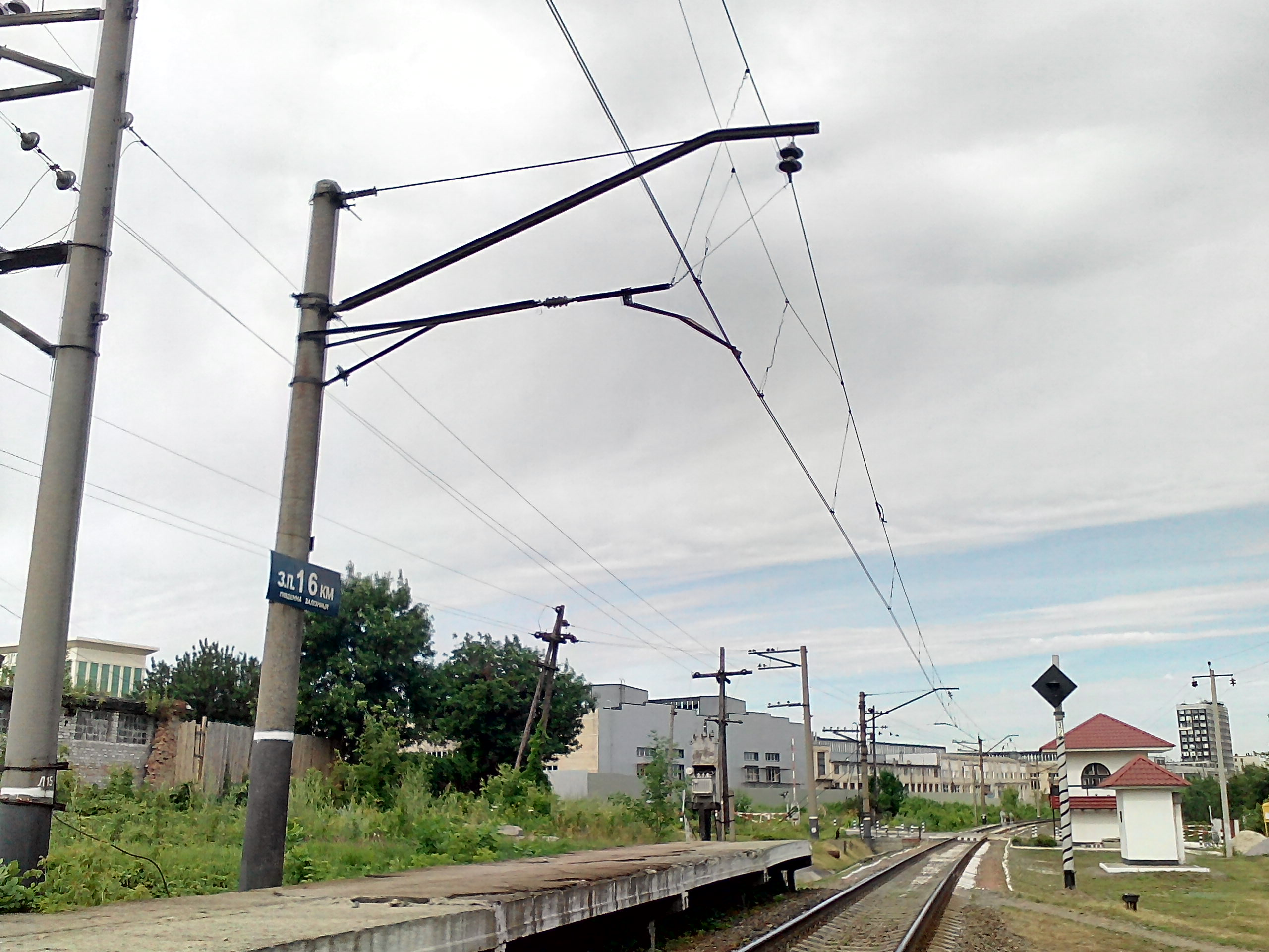 Зупинний пункт 16 км. Південна залізниця. Укрзалізниця. М. Харків. Україна